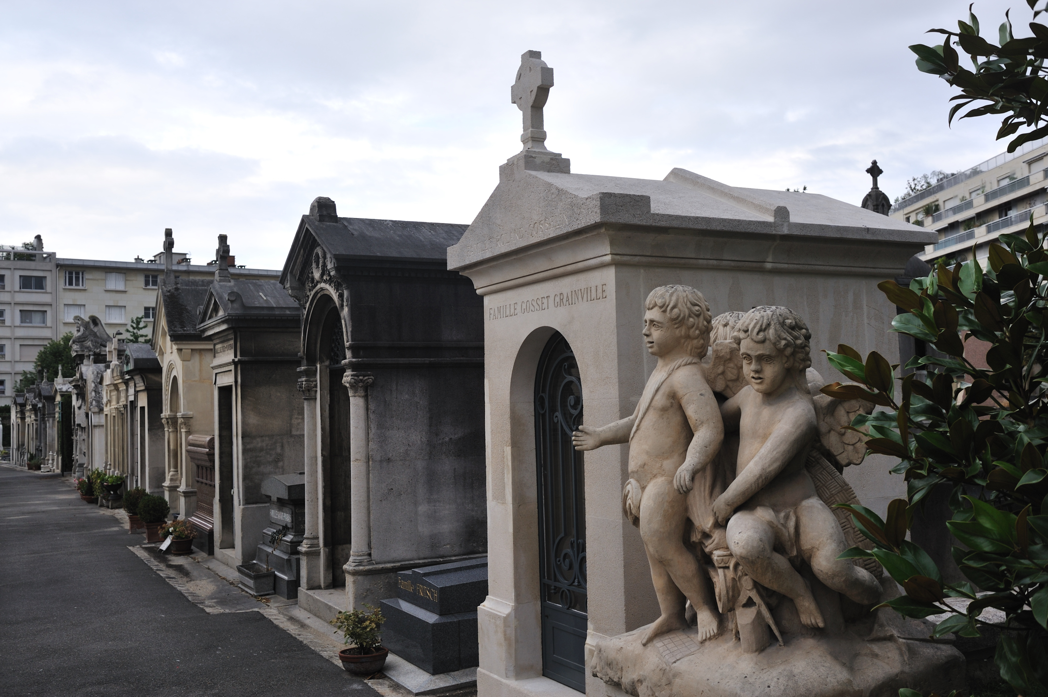 Cimetière de Neuilly-sur-Seine, Hauts-de-Seine, France